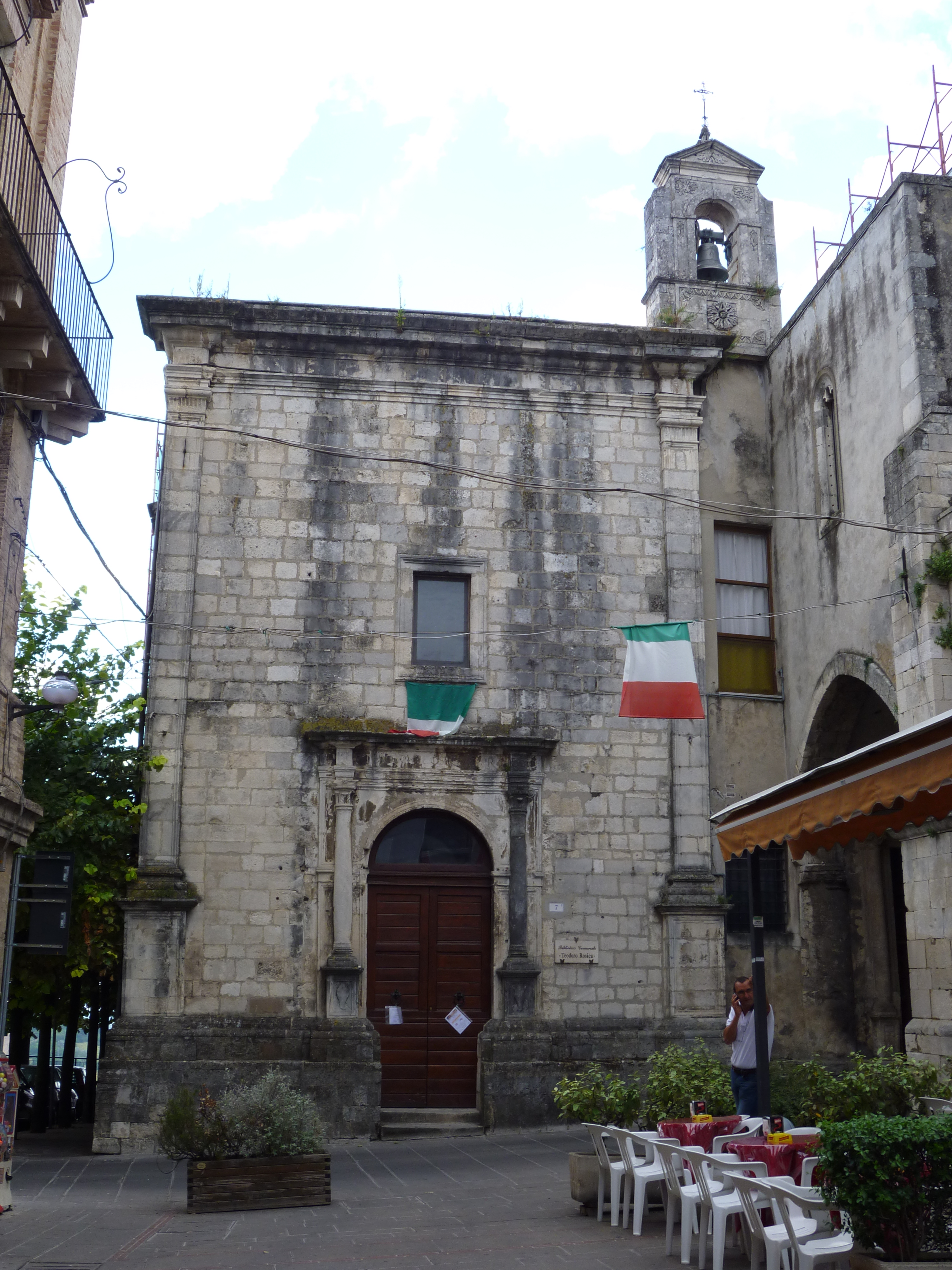 Biblioteca di Guardiagrele, Chieti, Abruzzo